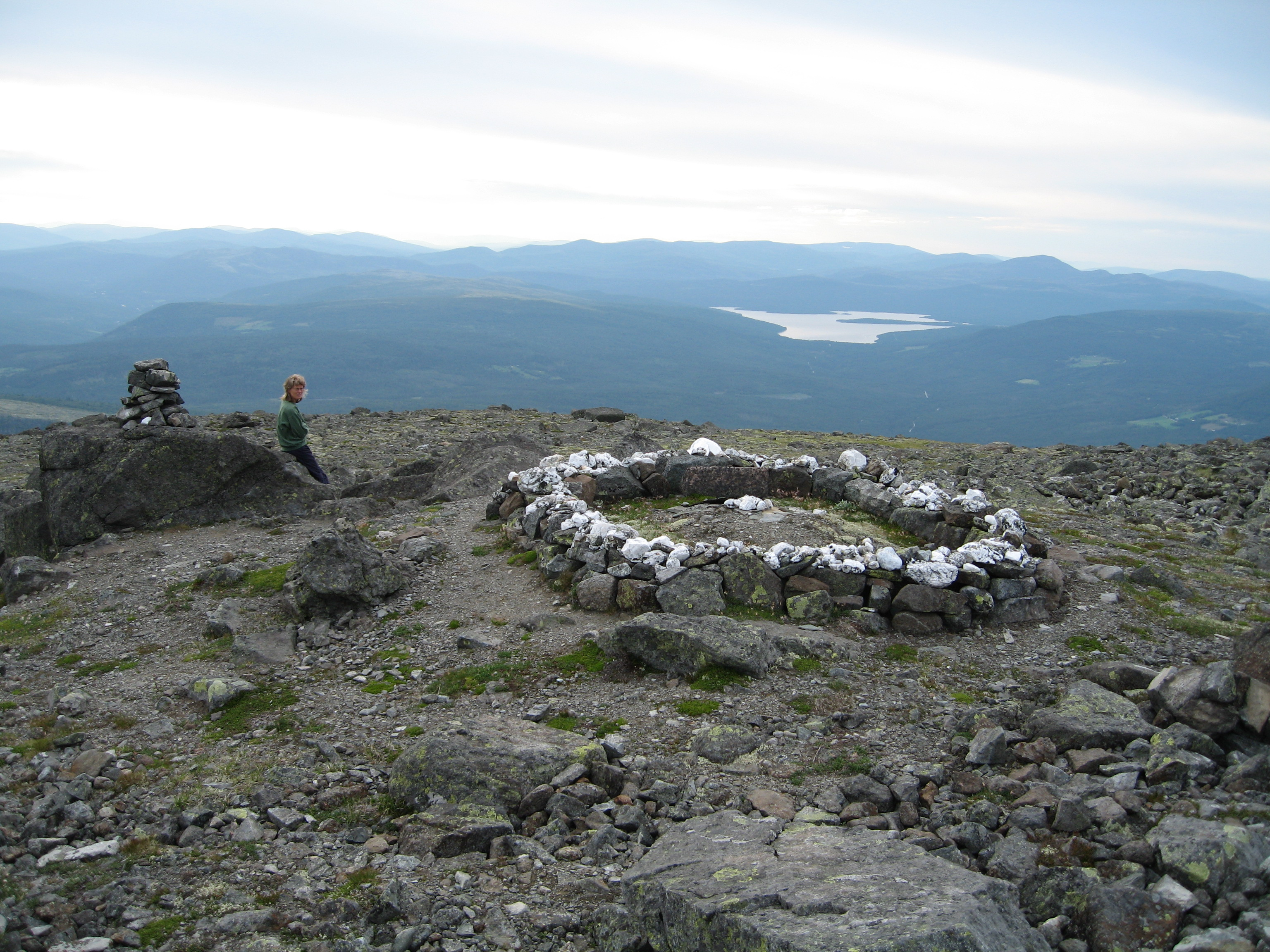 Barals grav